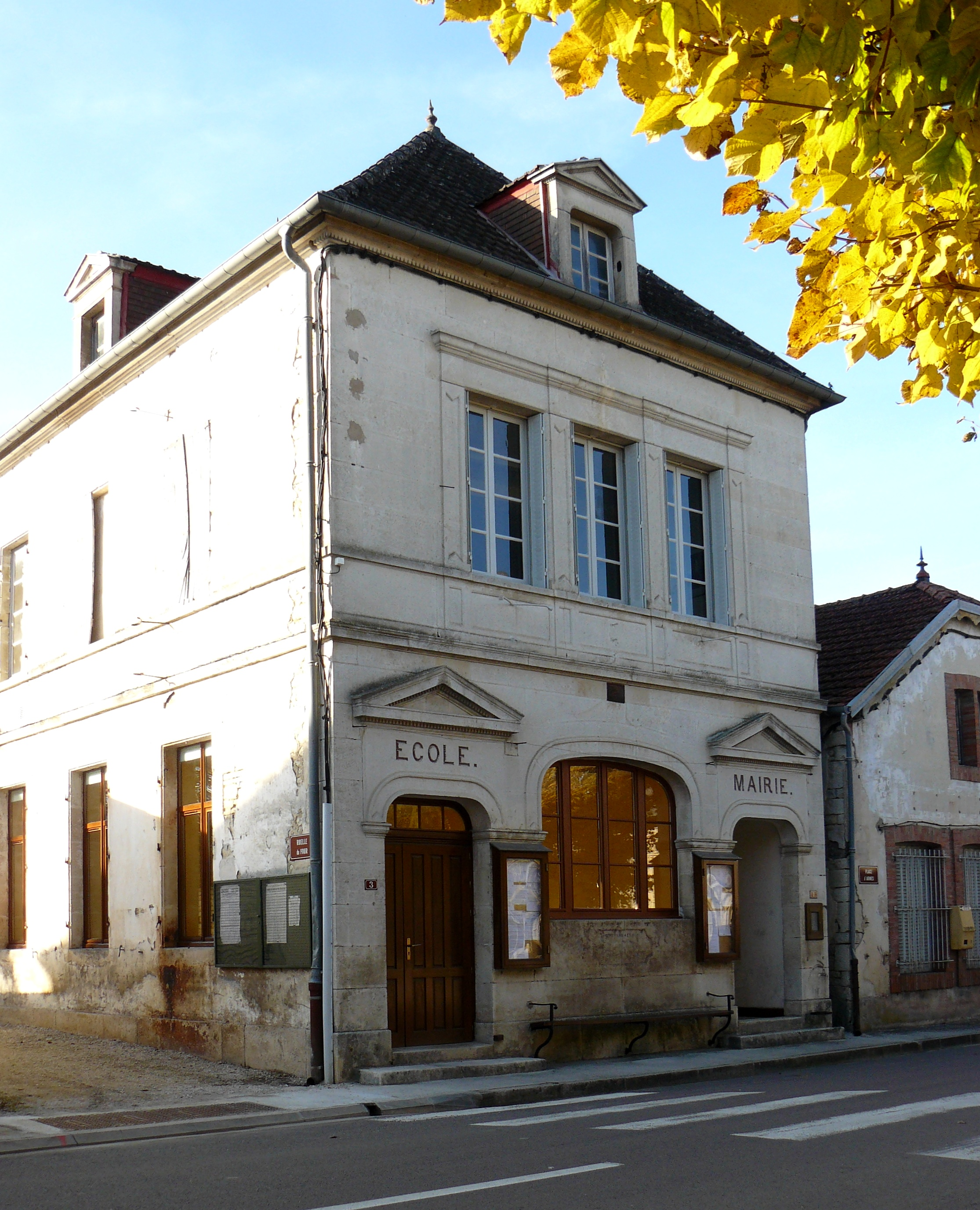 Autricourt (Côte d'Or - France) La mairie, ancienne école